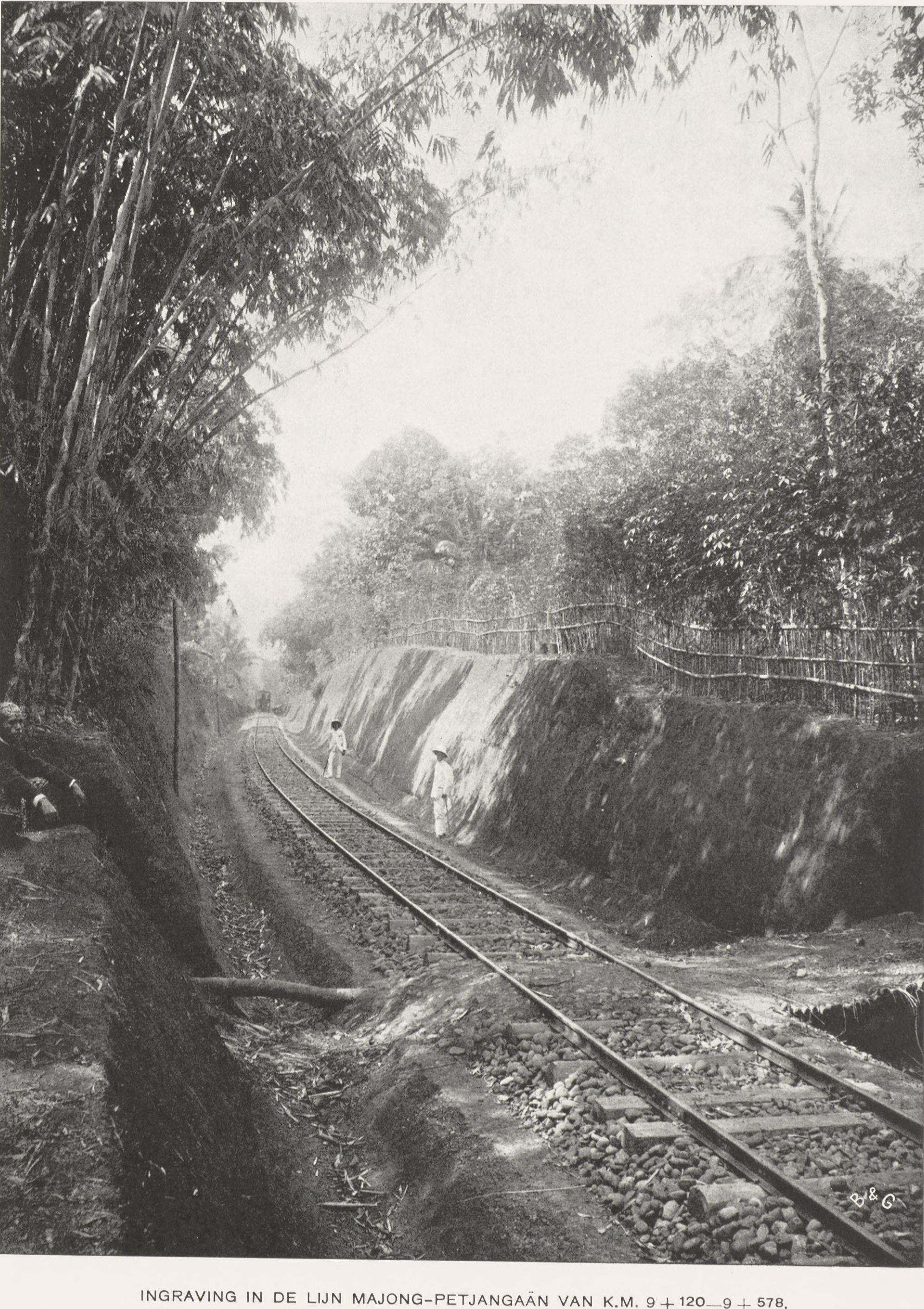 Jalur KA Mayong-Pecangaan di KM 9+120 s.d. Km 9+578